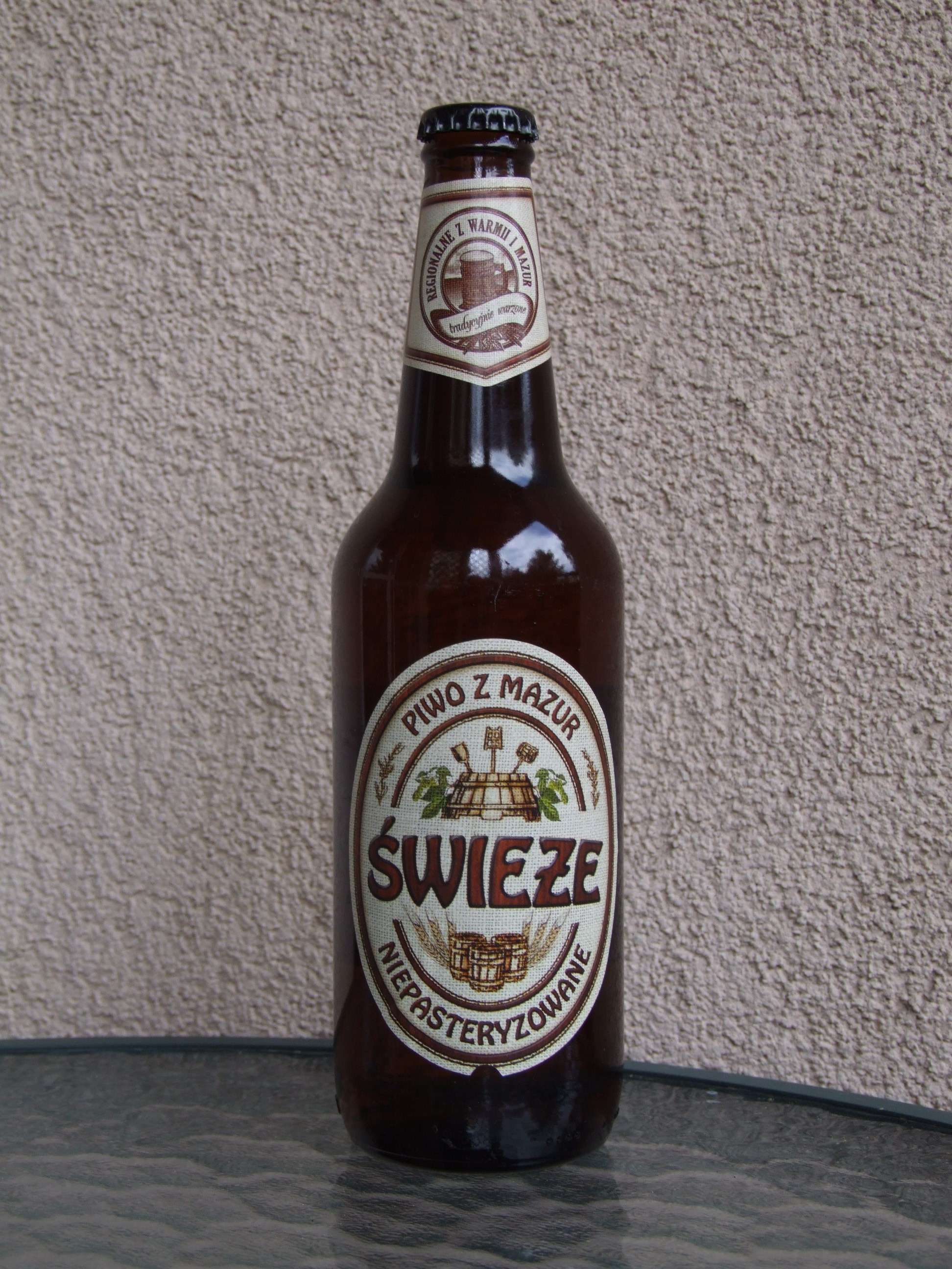 Piwo "Świeże" z browaru Kormoran